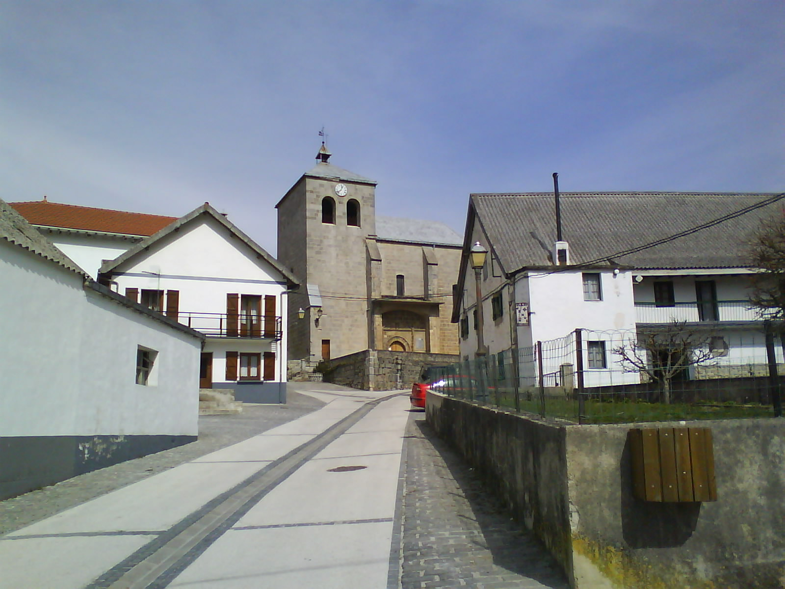 Orbaizetako eliza.